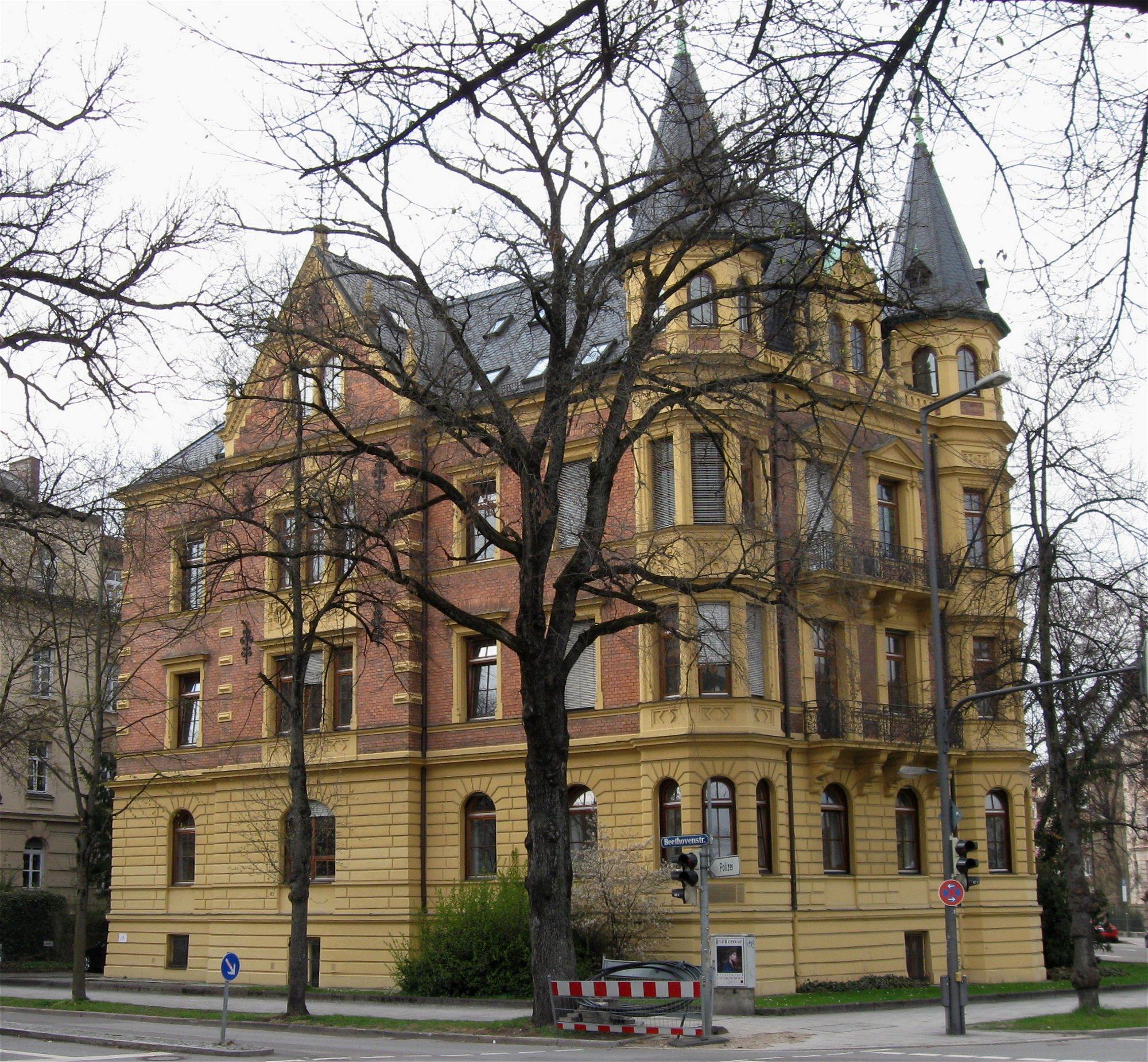 Rückertstraße 1; Malerisches Mietshaus, deutsche Renaissance, reich gegliedert, 1889–90 von Johann Baptist Graser